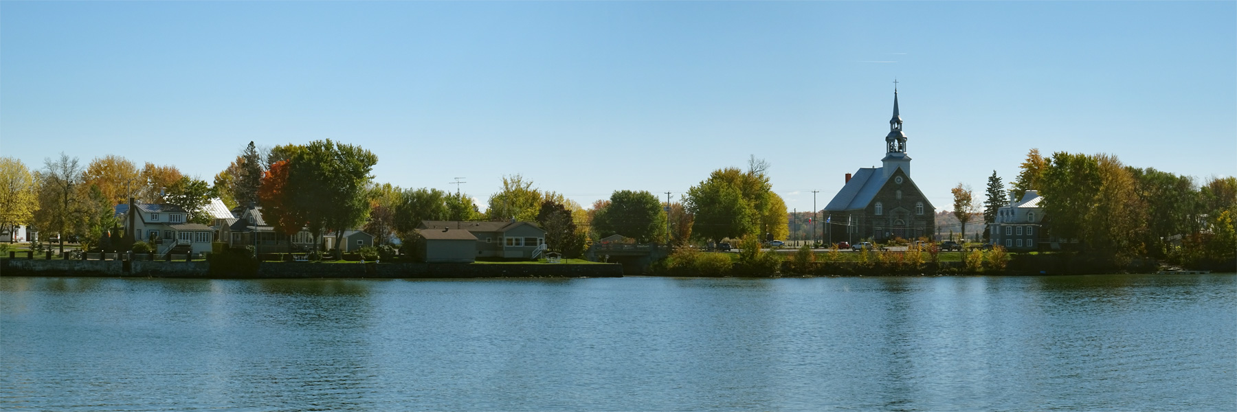 Saint-Charles-sur-Richelieu, Montérégie, Québec, Canada.